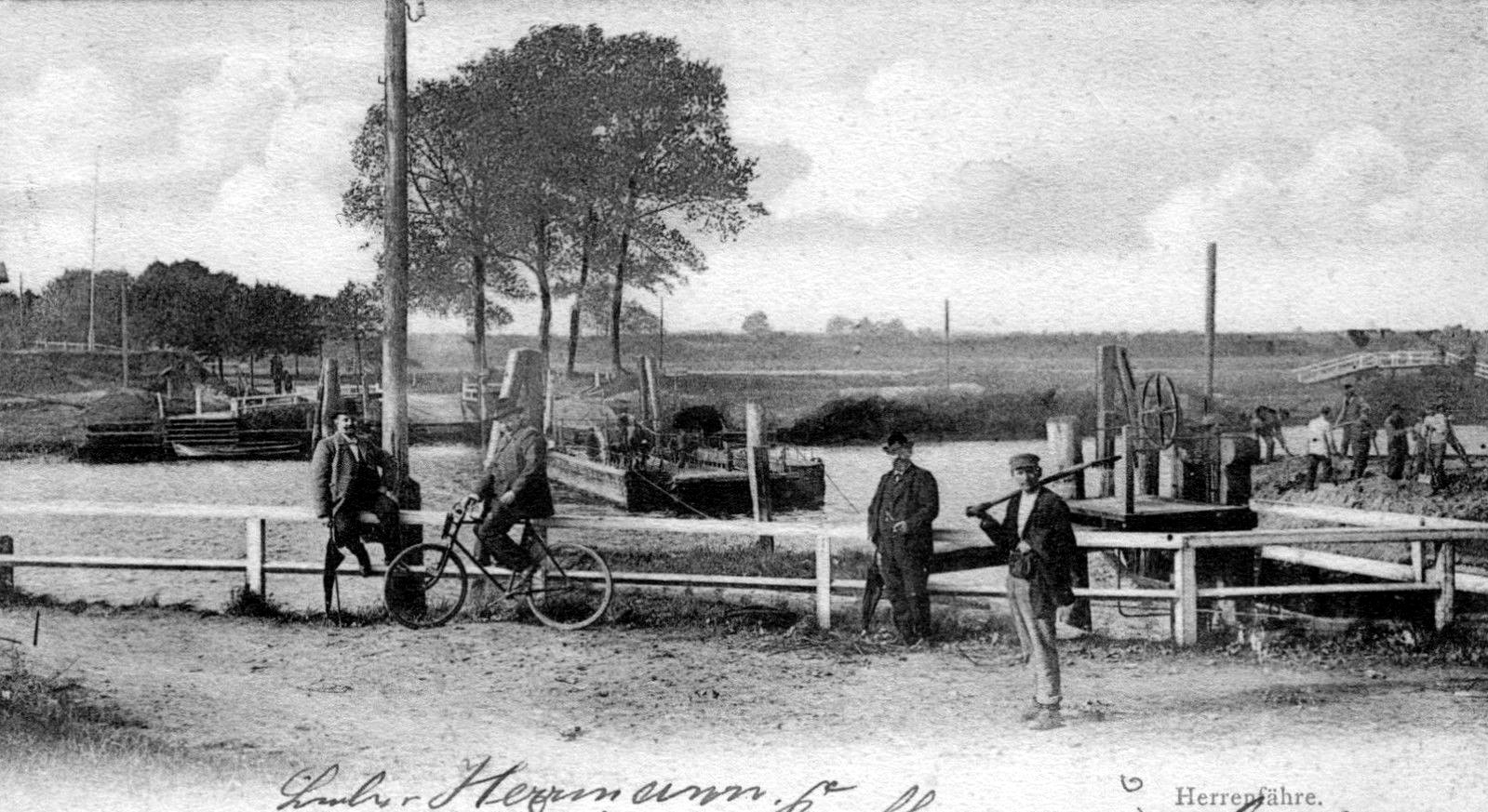 Travequerung durch die Herrenfähre vor dem Bau der Herrenbrücke